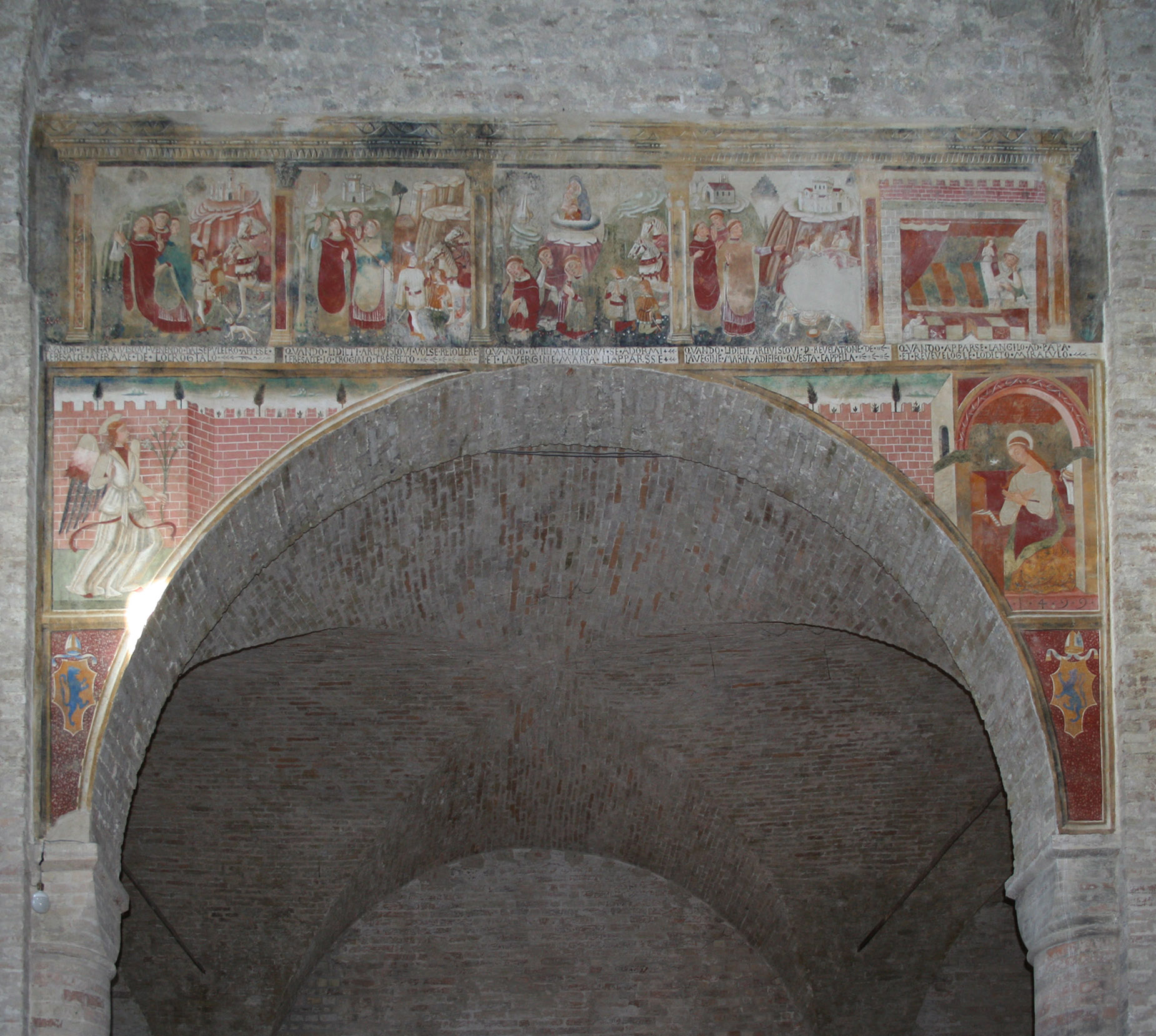 Chiesa di Santa Maria di Propezzano, dipinto sull'arco della navata sinistra all'interno dell'edificio religioso appartenente al complesso abbaziale omonimo nelle vicinanze del paese di Morrod’Oro in provincia di Teramo, Abruzzo, Italia.